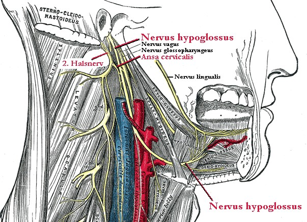 Image:Gray794.png German/deutsche Beildbeschreibung Bild nachbearbeitet von Benutzer:Uwe Gille